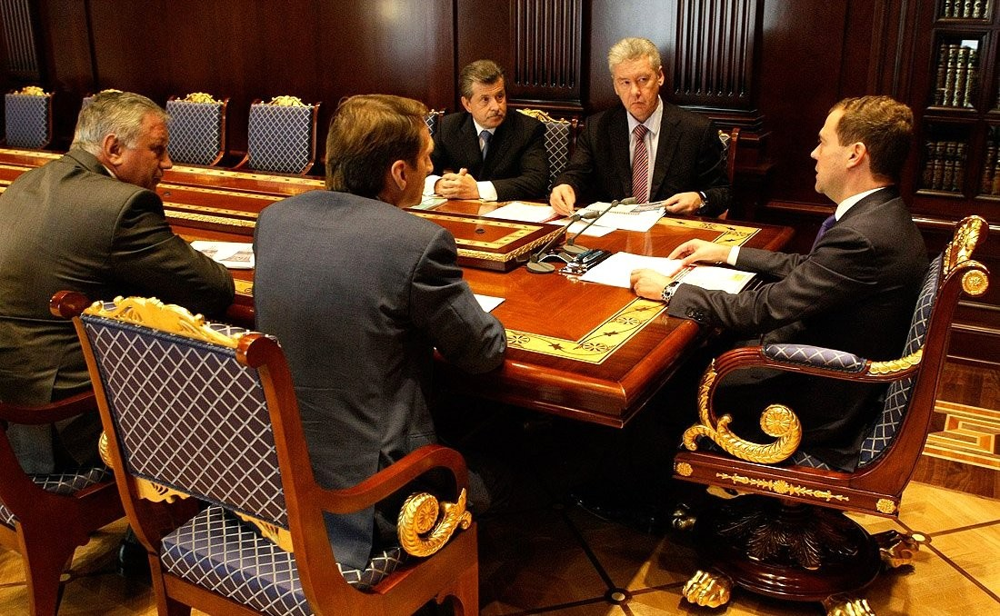 Совещание по подготовке к празднованию 1000-летия Ярославля. В совещании приняли участие Руководитель Администрации Президента Сергей Нарышкин, Заместитель Председателя Правительства – Руководитель Аппарата Правительства Сергей Собянин, губернатор Ярославской области Сергей Вахруков и мэр Ярославля Виктор Волончунас.